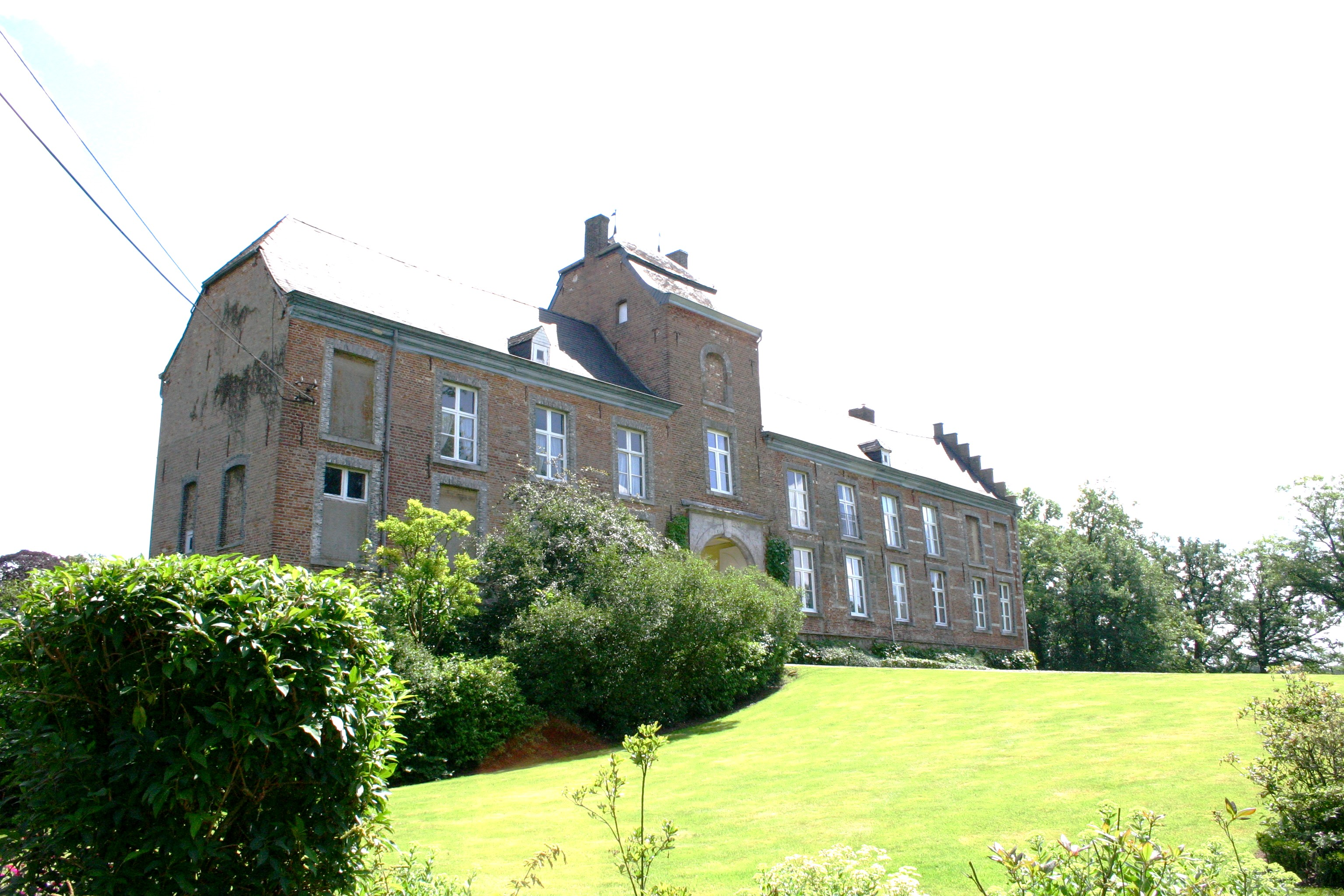 D'Schlass de Burg.